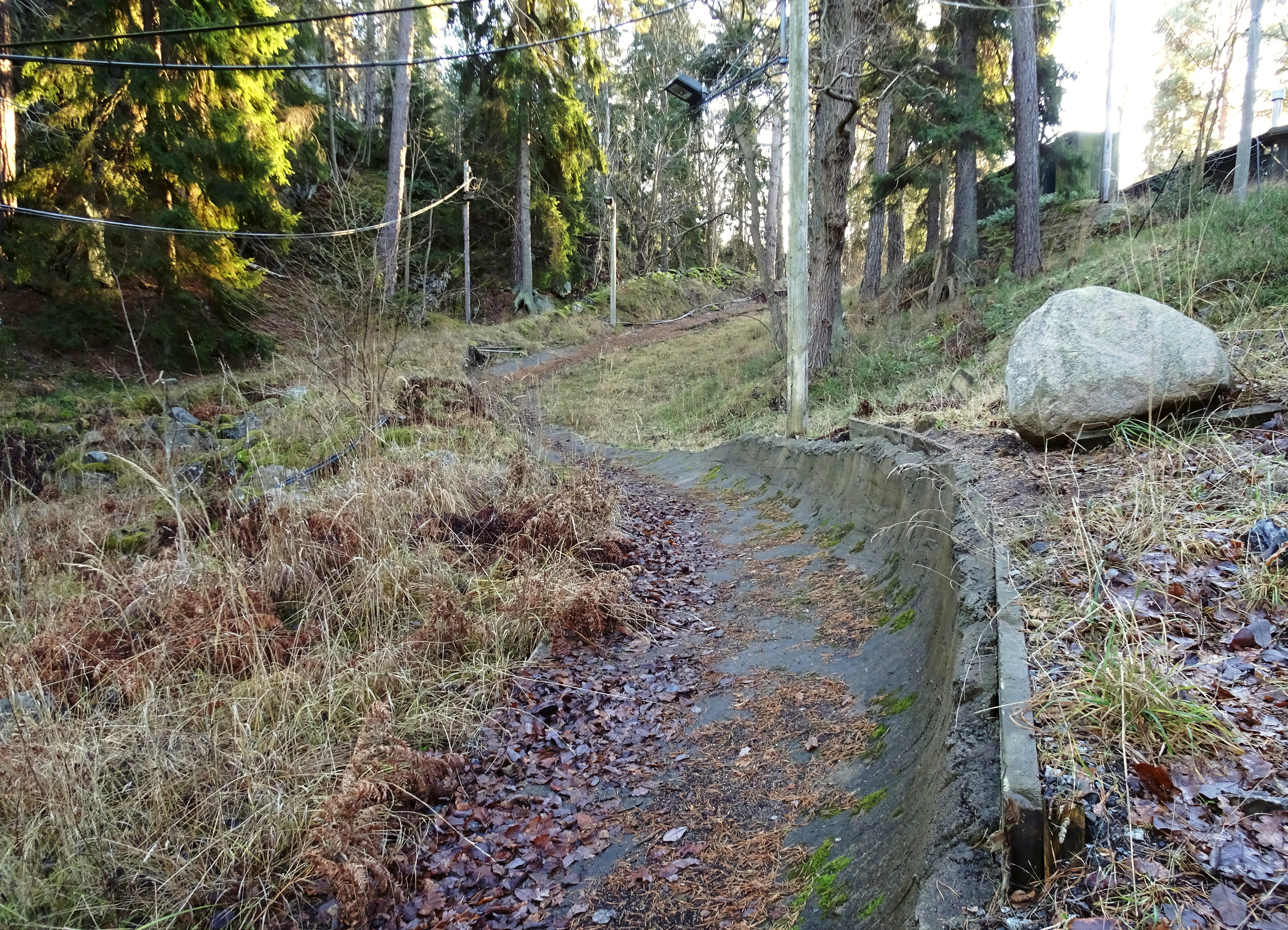 Vinterstadion Saltsjöbaden, gamla bobbanan